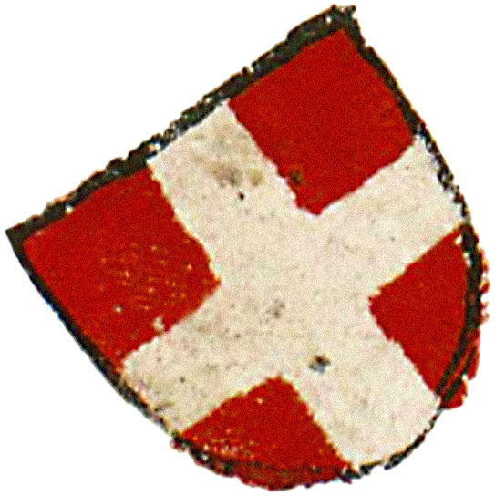 Геральдический крест из Кодекса Бергсхамар (Codex Bergshammar). Первый герб Новогрудской земли по мнению Е. Лойко (Łojko J. Chorągwie polskie i litewskie w bitwie pod Grunwaldem.// Lituano-Slavica Posnaniensia. Poznań, 1989. Studia historica. T.ІІІ. — S. 149, 151, № 6.)